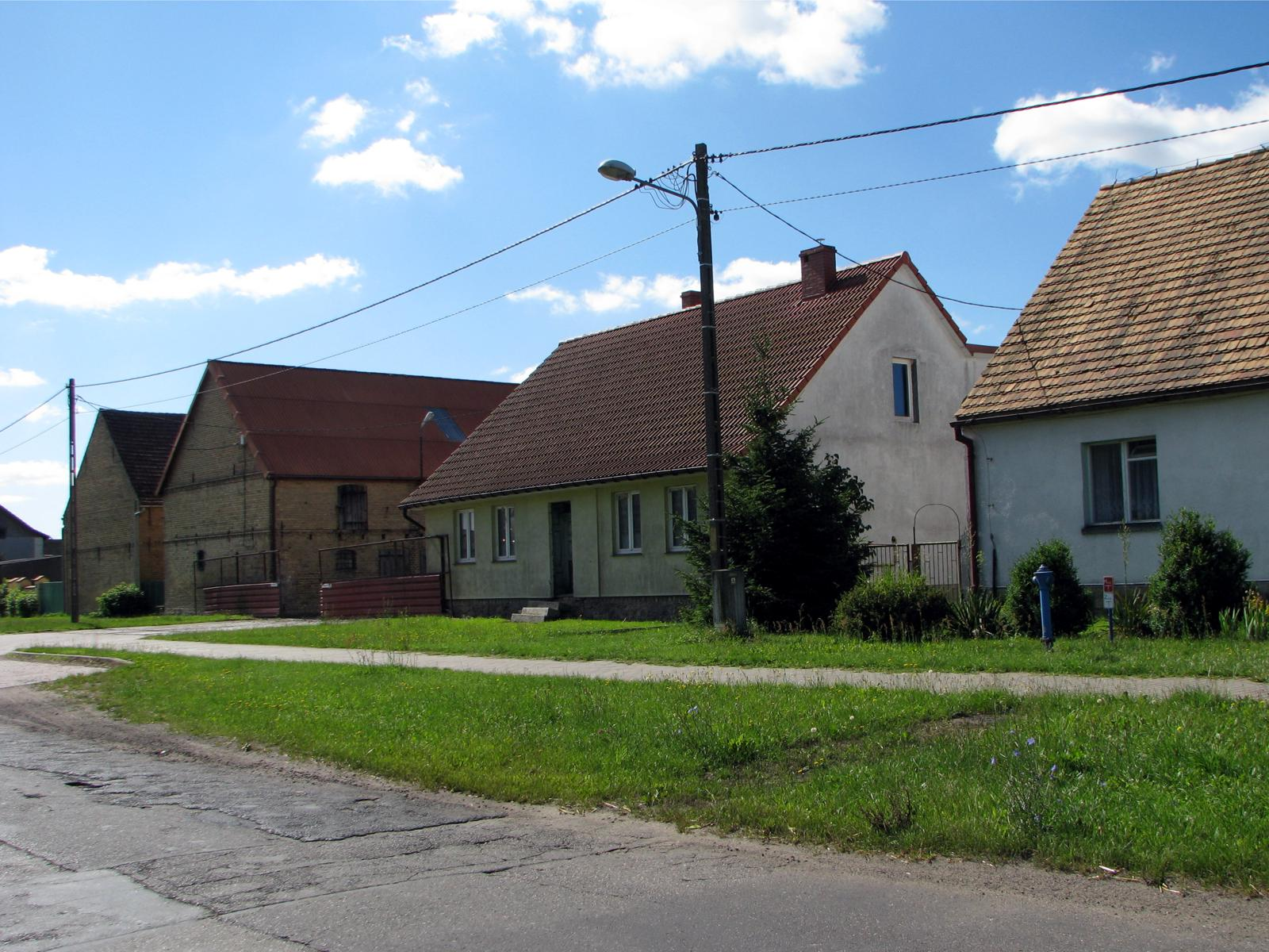 Wojcieszyce. Zabytkowe domy przy ul. Wspólnej